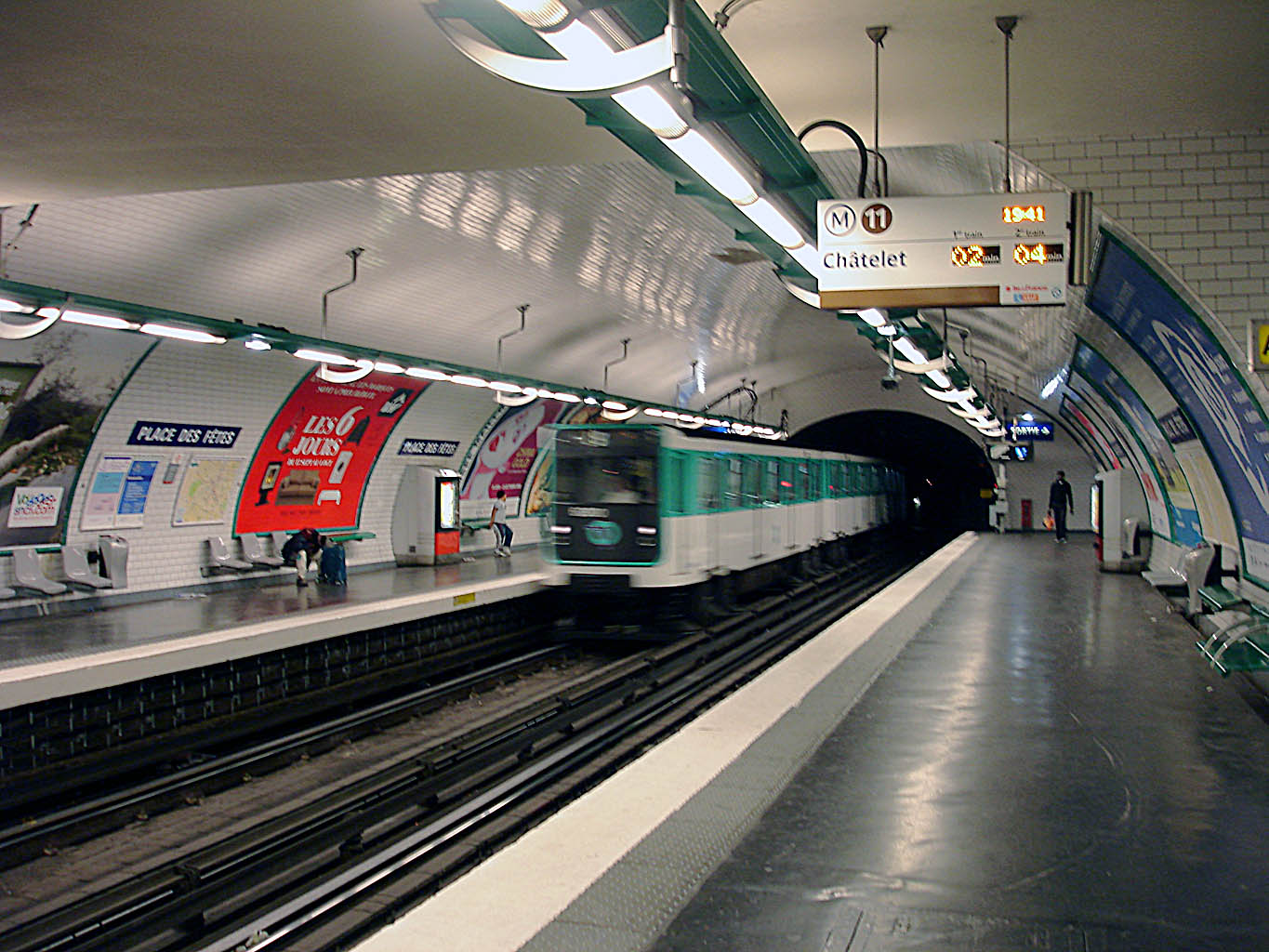 Station Place des Fêtes, de la ligne 11 du métro de Paris, France.